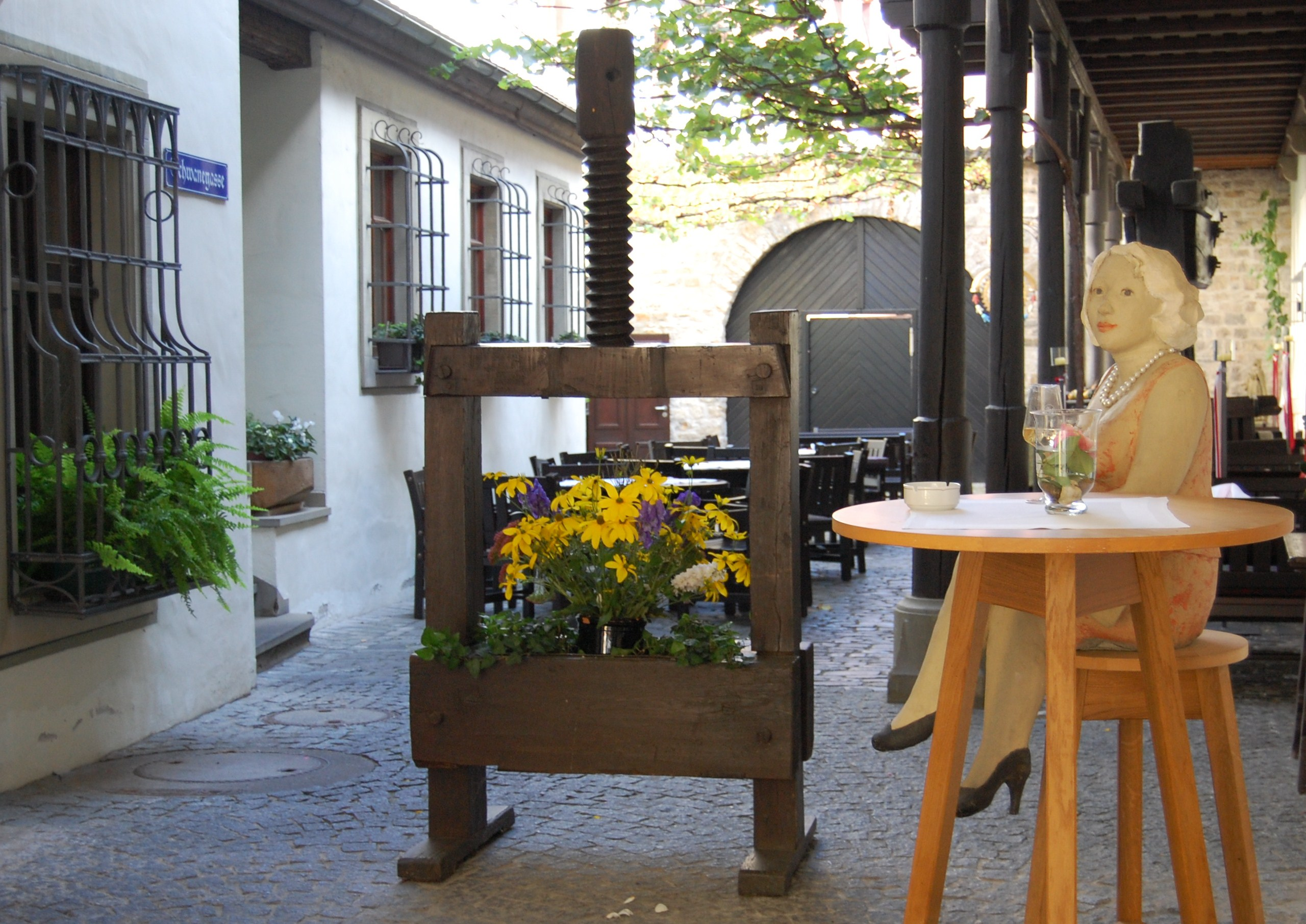 Heckenwirtschaft am Gasthof Schwane in Volkach